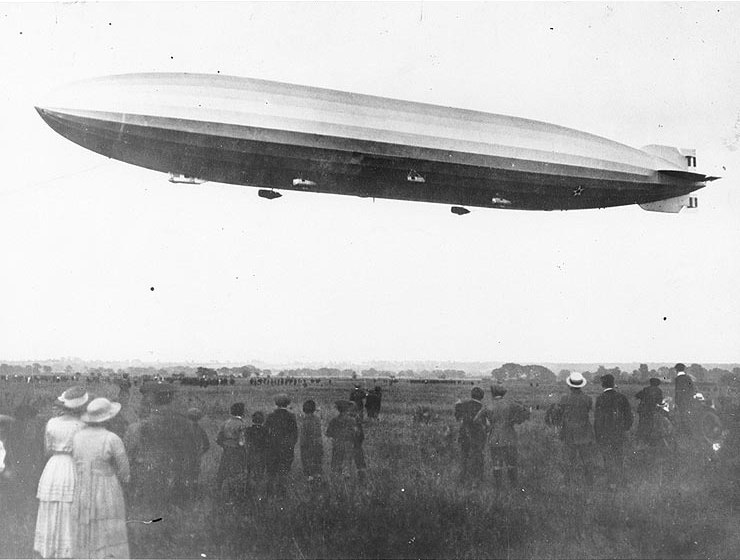 Das britische Starrluftschiff R38 (gebaut im Auftrag der US-Marine, vorgesehene Bezeichnung: ZR-II) unternimmt seine erste Testfahrt in Cardington, England am 23. Juni 1921. Das Schiff trägt bereits US-Markierungen. Originalbeschreibung British airship R-38 (U.S. Navy ZR-2) Makes its first trial flight, at Cardington, England, 23 June 1921. Note that the airship already wears U.S. markings. U.S. Naval Historical Center Photograph.